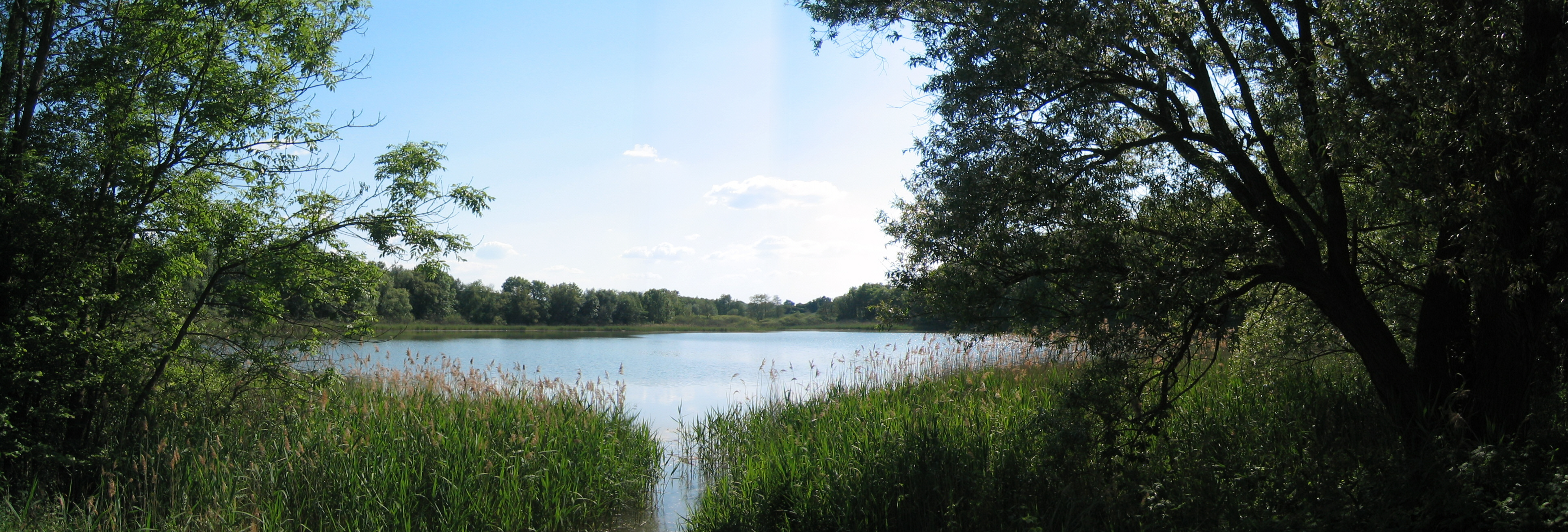 Polßener See in der Uckermark zwischen Grünheide und Schmiedeberg.